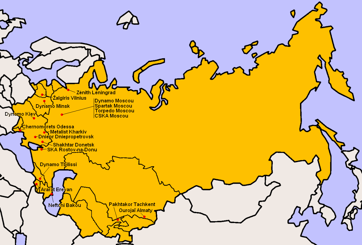 Clubs participants à la Division Supérieure 1984.